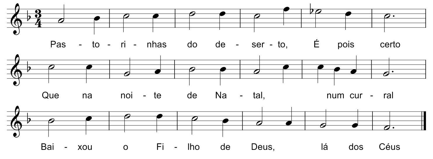 Pastorinhas do deserto uma canção de Natal do Ribatejo. Adaptada da obra Velhas Canções e Romances Populares Portugueses (1913) de Pedro Fernandes Tomás.